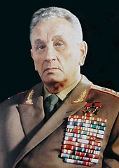 Андрей Антонович Гречко (1903 — 1976) — советский военачальник, Маршал Советского Союза.